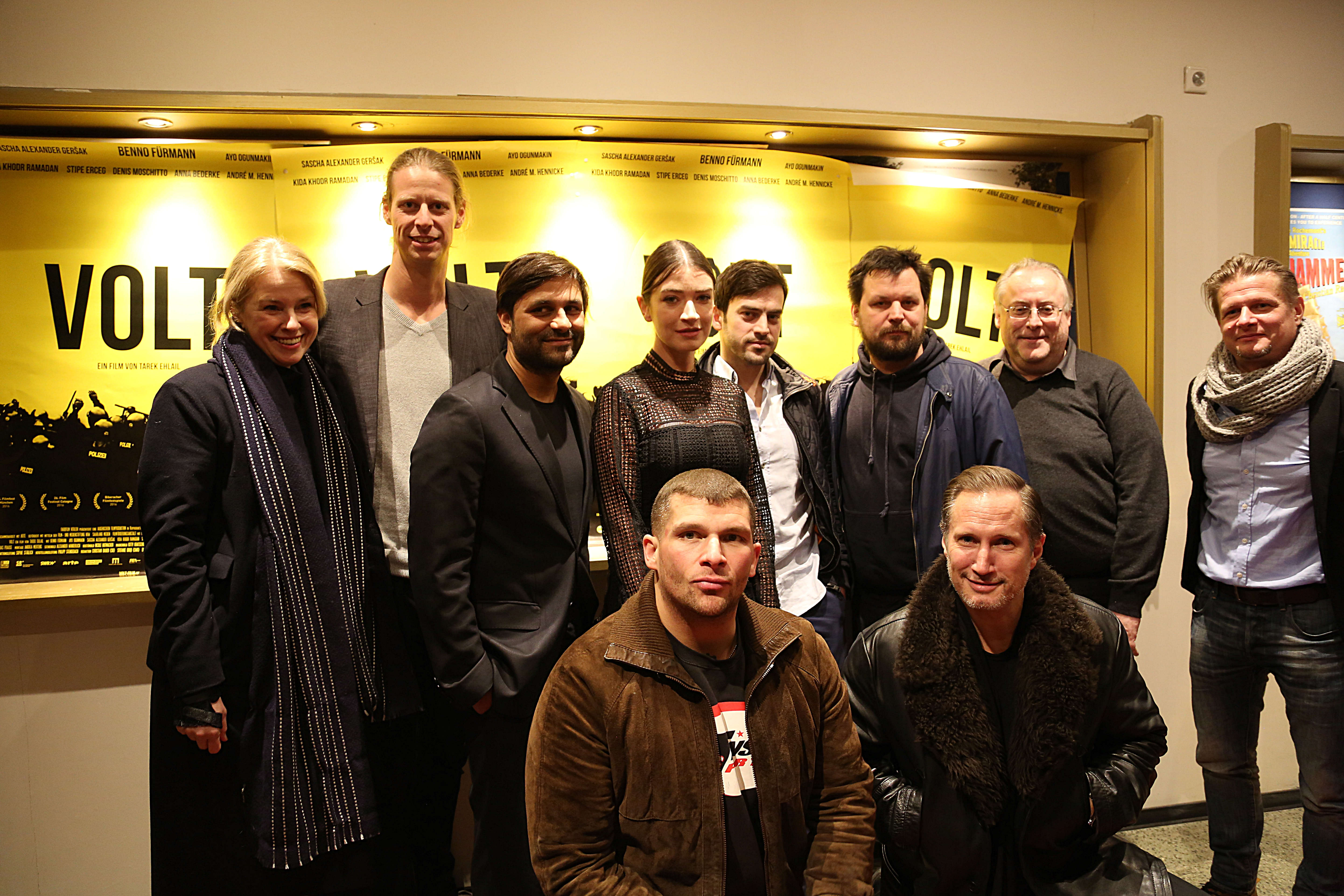 Cast und Crew ( u.a. Britta Lengowski (Film- und Medienstiftung NRW), die Produzenten Jonas Katzenstein und Maximilian Leo (augenschein), Tarek Ehlail, die Darsteller Anna Bederke, Surho Sugaipov, Benno Fürmann und Sascha Alexander Gersak, Kalle Somnitz (Düsseldorfer Filmkunstkino) und Reno Koppe (farbfilm-Geschäftsführer)) bei der NRW-Premiere von "Volt", Januar 2017.